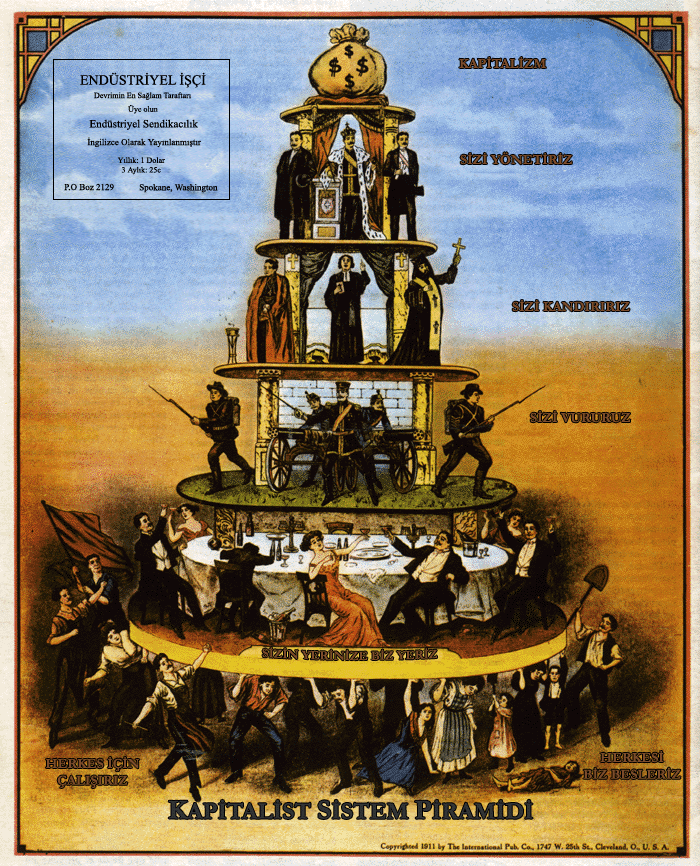 Industrial Workers of the World (IWW) tarafından 1911 yılında bastırılan poster. - kaynağındaki orijinali dijital ortamda işlenerek Türkçe'ye çevirildi.